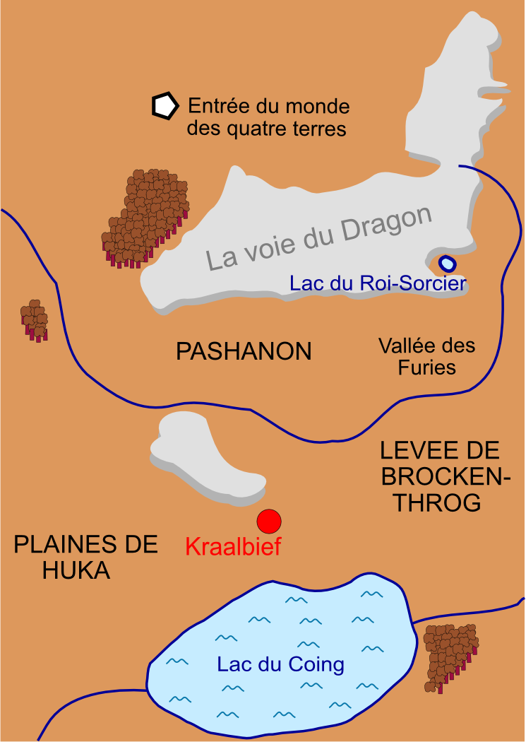 Monde des Jarka Ruus dans le cycle Shannara